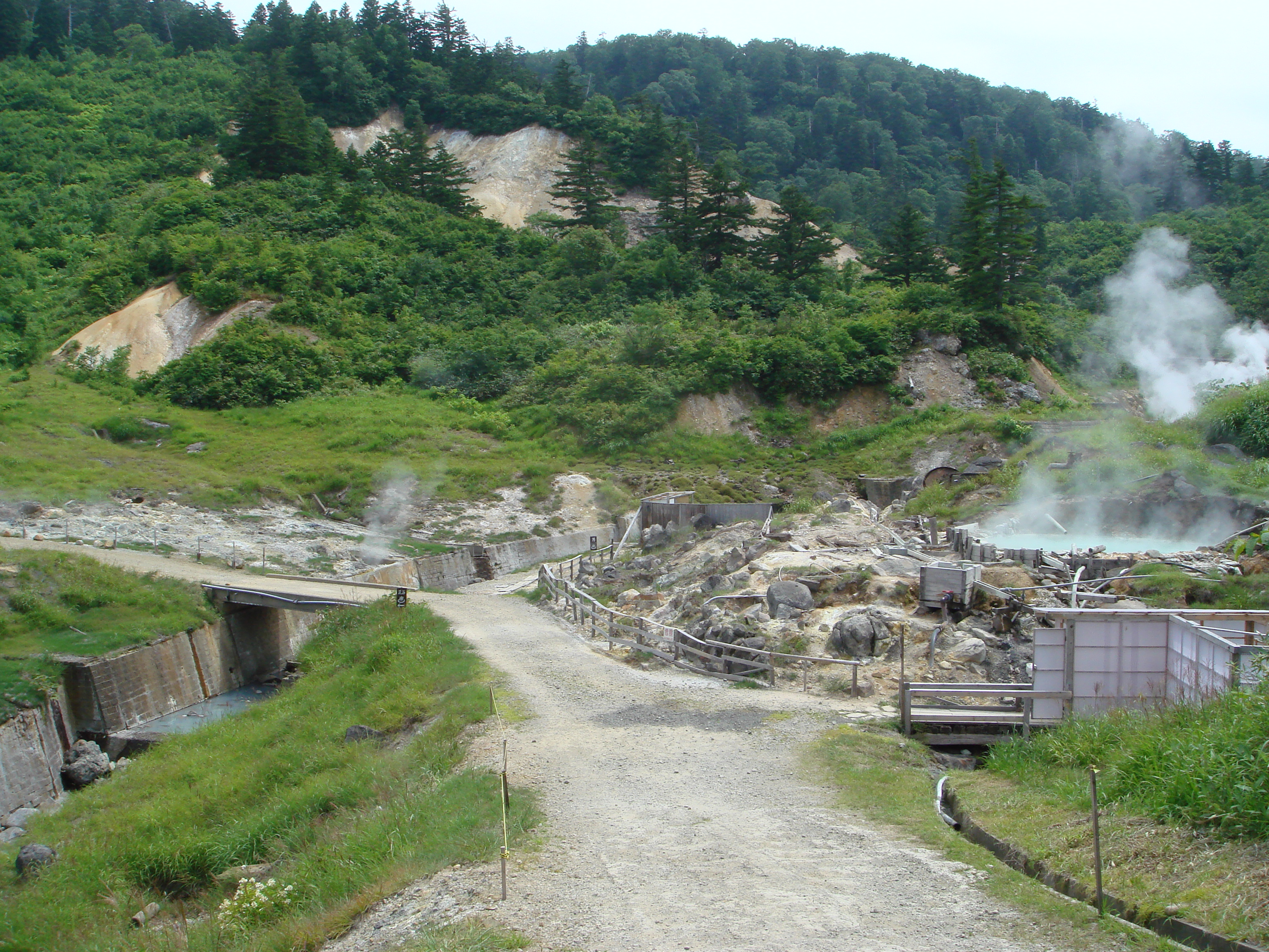 秋田県・蒸ノ湯温泉 (Fukenoyu Spa, Akita-pref, Japan)